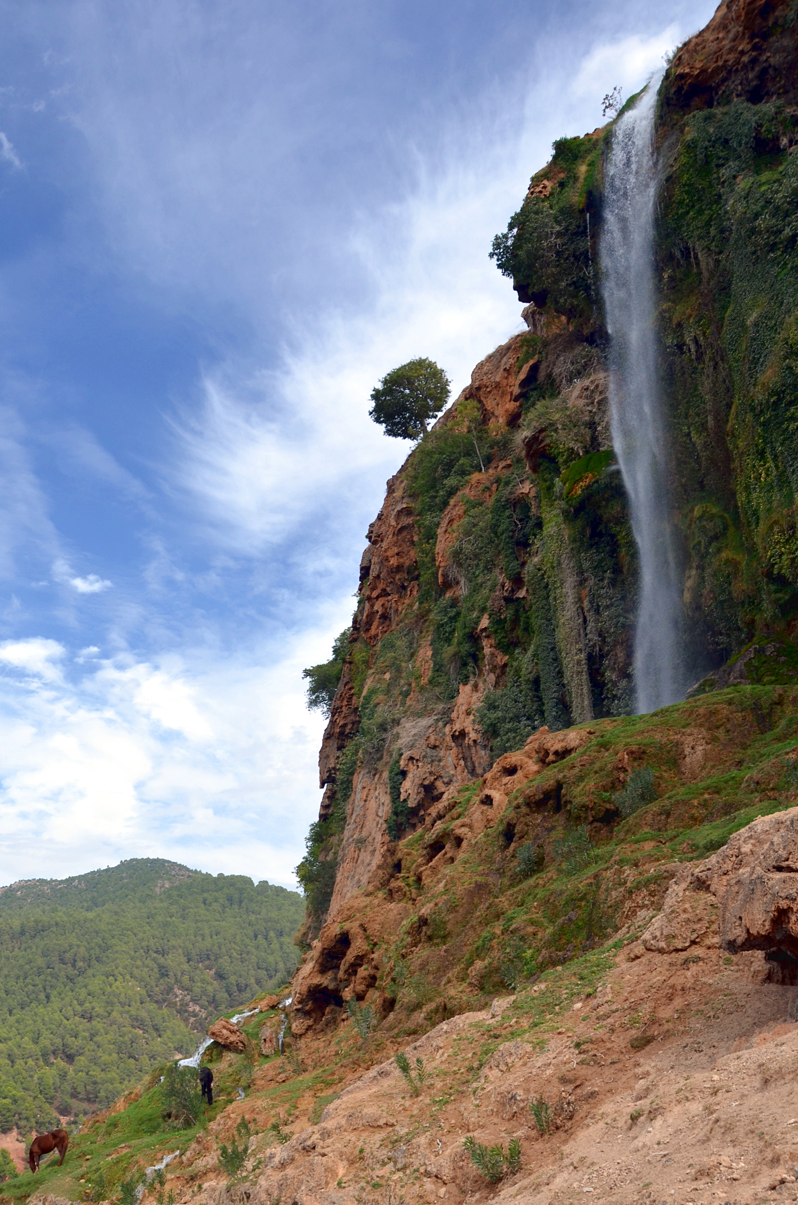 Водопад в Зауя д'Ифран.